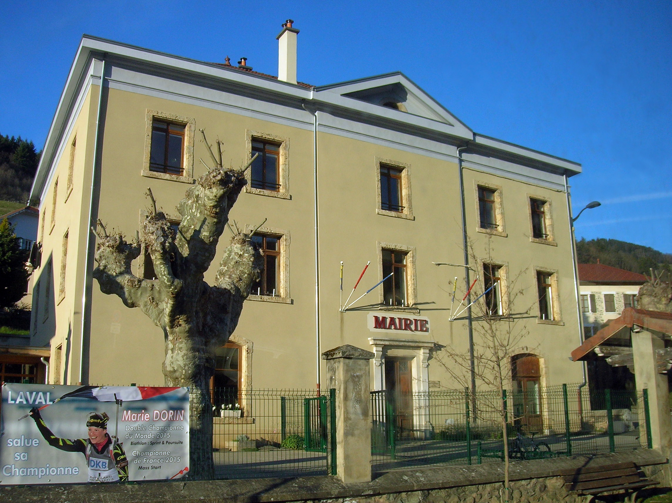 mairie de Laval (Isère)